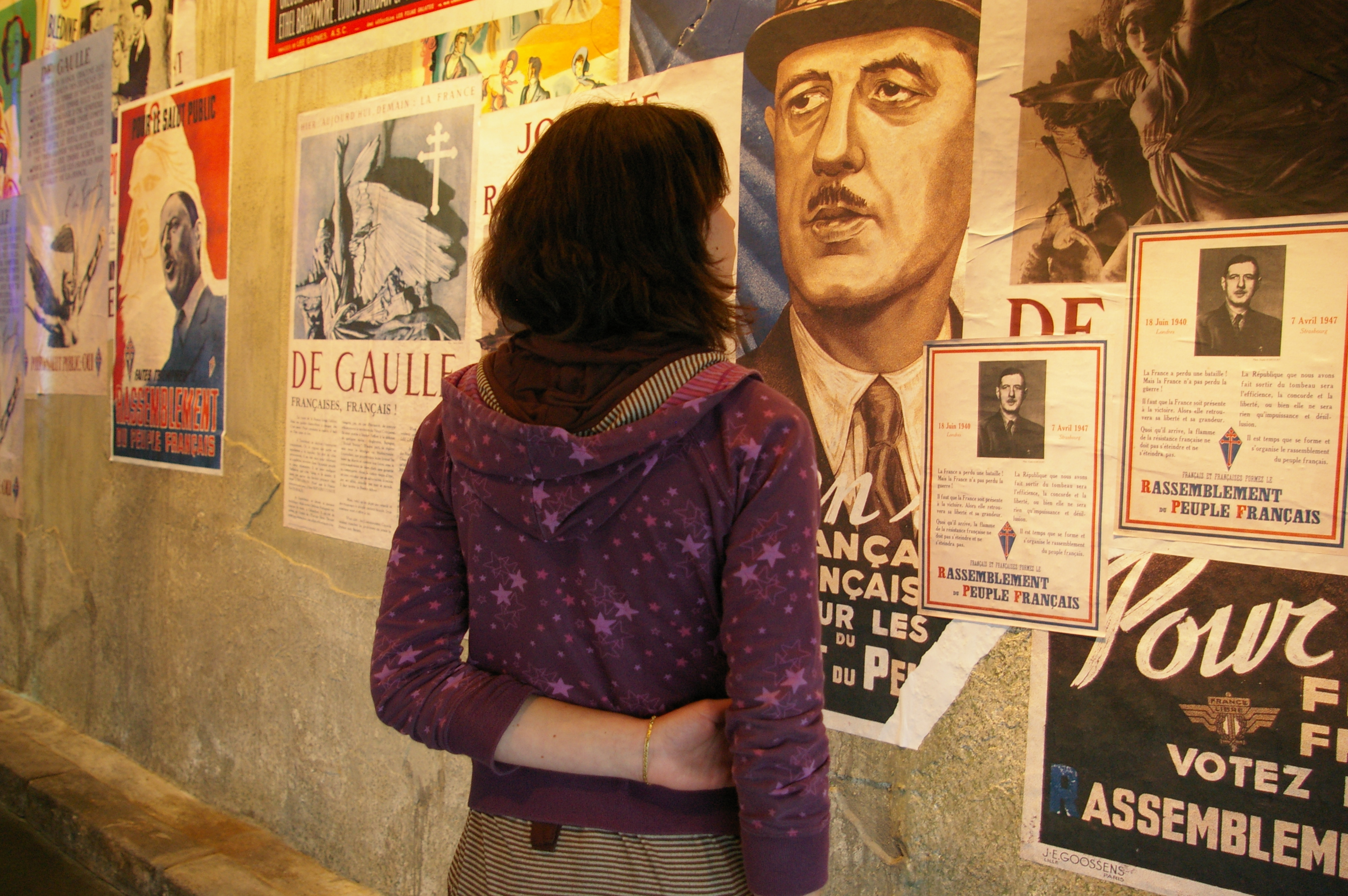 Mémorial Charles de Gaulle- Colombey-les-deux-églises